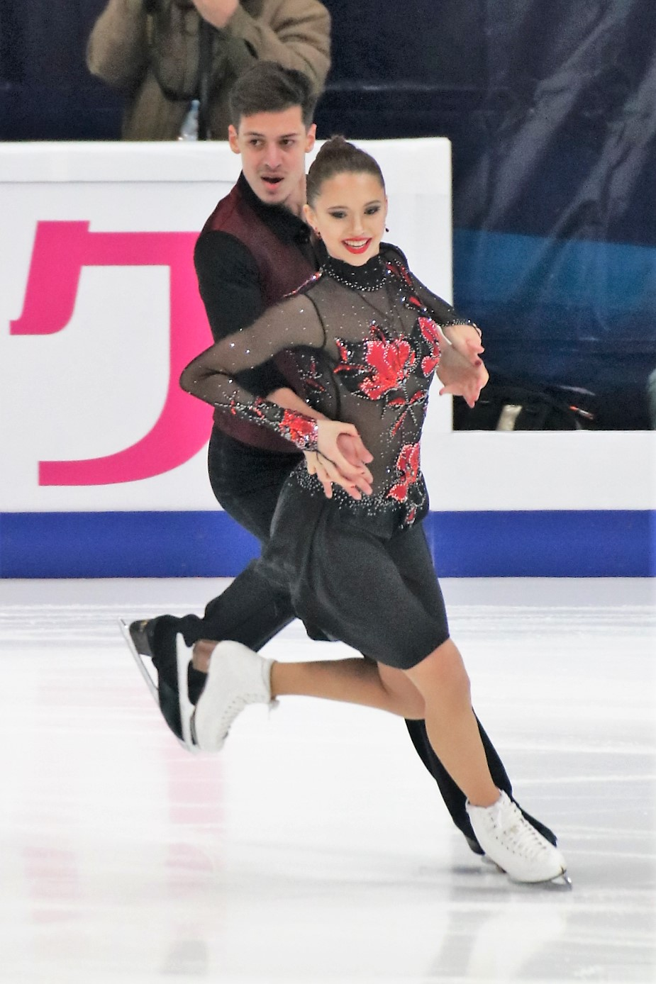 Аннабель Морозов / Андрей Багин (Россия) на Rostelecom Cup 2018